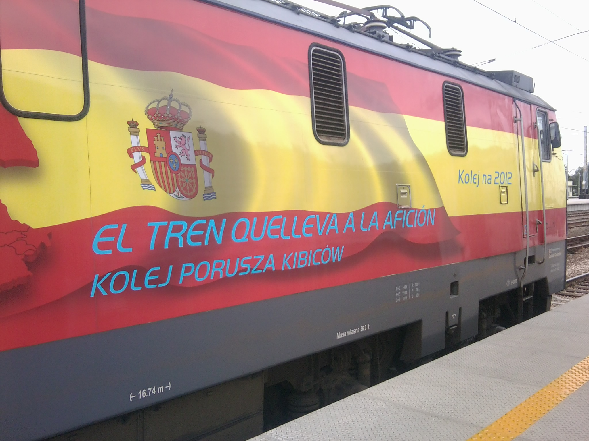 Lokomotywa EP09-010 oklejona w barwy Hiszpanii z okazji EURO 2012.